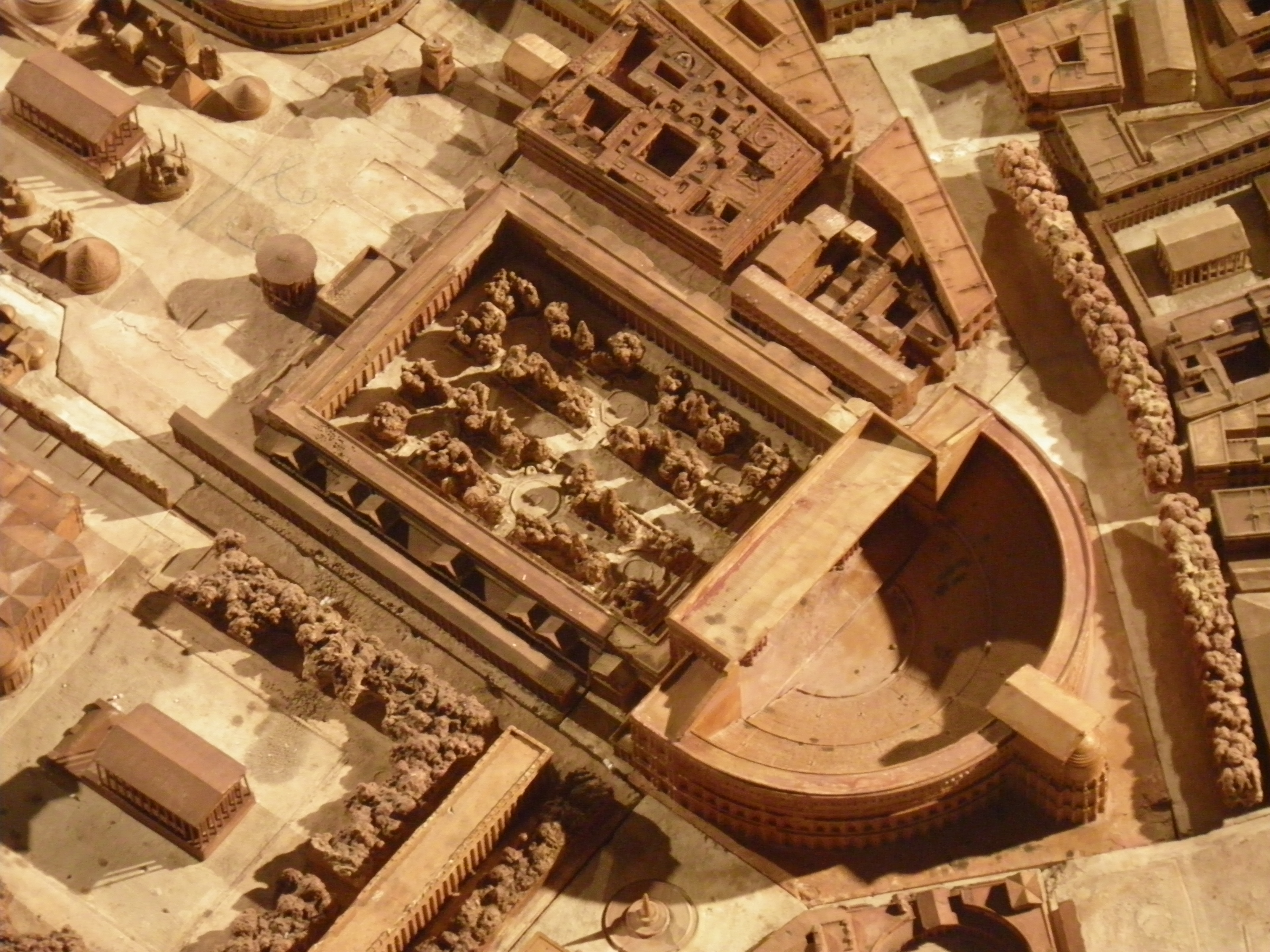 Théâtre de Pompée, Plan de Rome de Paul Bigot, université de Caen MRSH